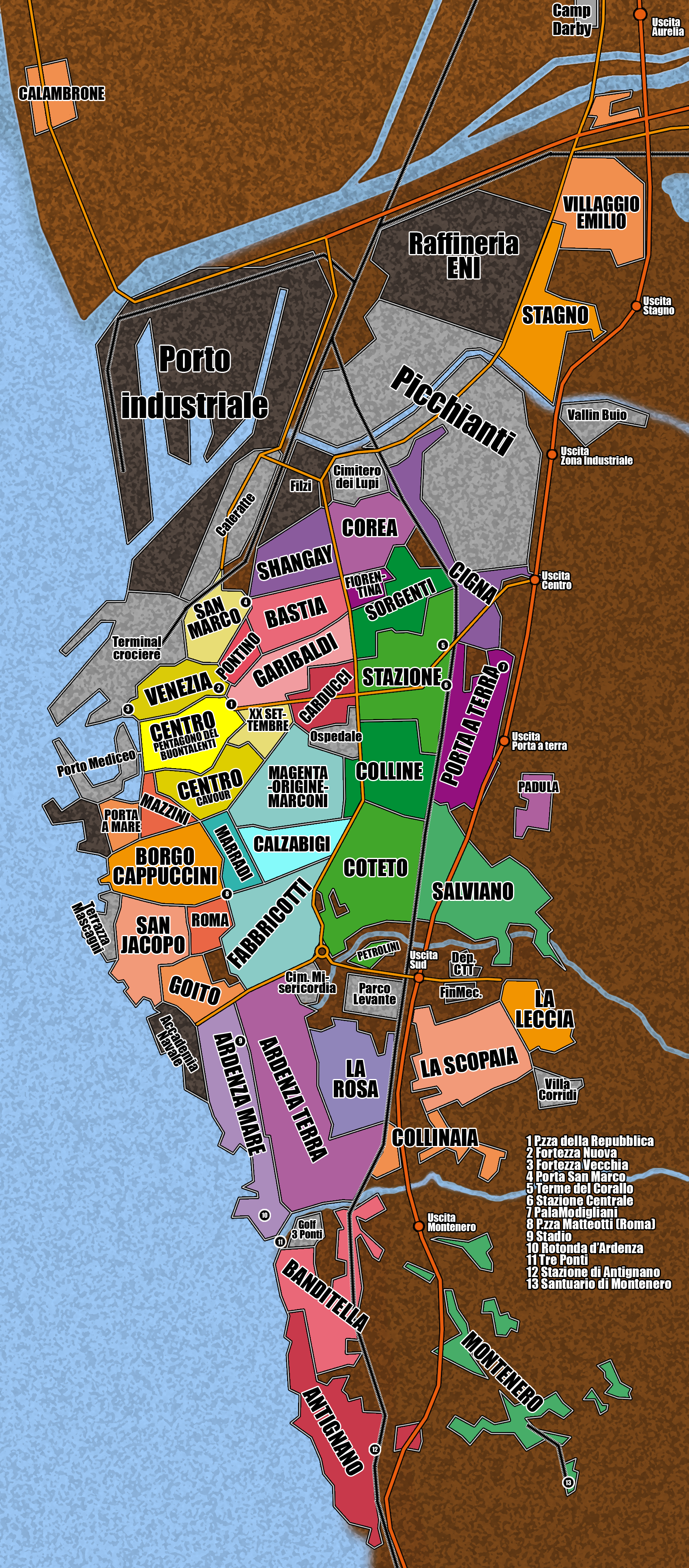 Mappa non ufficiale dei quartieri di Livorno (infatti non esiste alcuna documentazione ufficiale che demarca i confini di tutti i quartieri, o che stabilisca le loro denominazioni ufficiali). Sono riportati i nomi delle aree, alcuni dei maggiori luoghi di interesse, nonché i principali corsi d'acqua, le superstrade (la tangenziale Variante Aurelia e la parte terminale della FI-PI-LI), le principali arterie di comunicazione (Aurelia vecchia, viale Carducci, Via di Levante, via delle Cateratte...) e le ferrovie. Non sono compresi nella mappa le frazioni sud e l'isola di Gorgona; sono rappresentati invece Stagno e Villaggio Emilio che non costituiscono quartieri di Livorno, ma sono frazioni del comune di Collesalvetti.